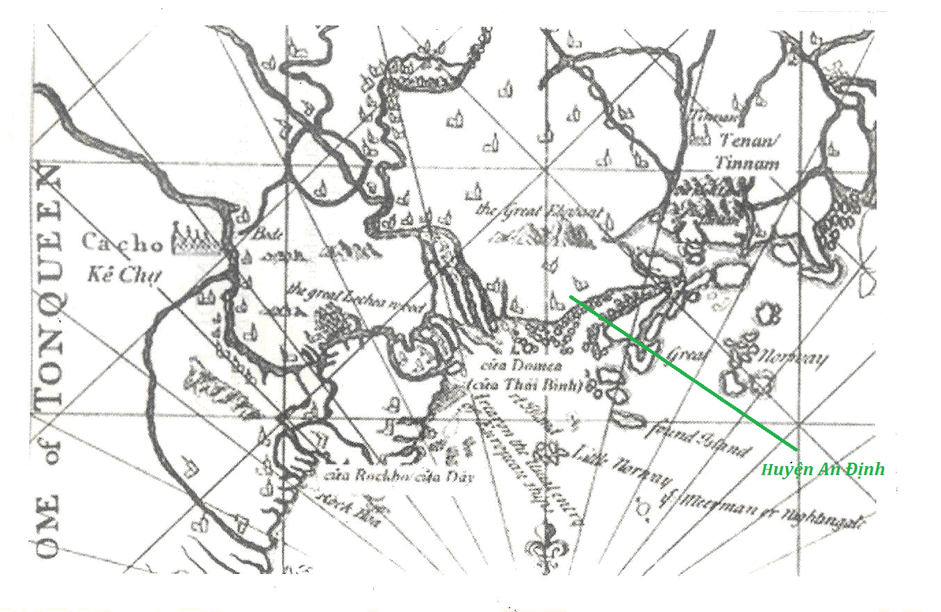 Bản đồ vẽ tay